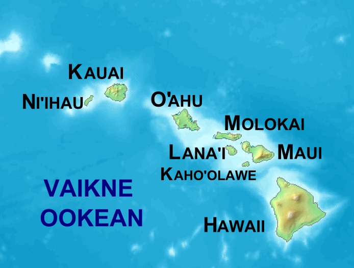 Hawaii saarte kaart